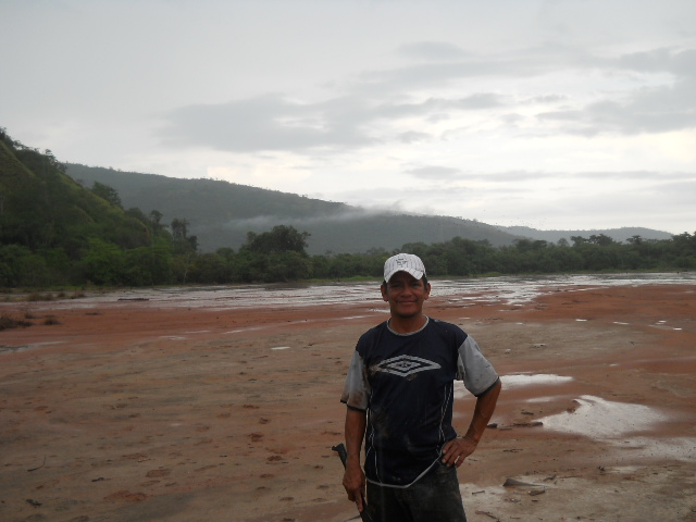 Poblador pilluanino en Cachipampa